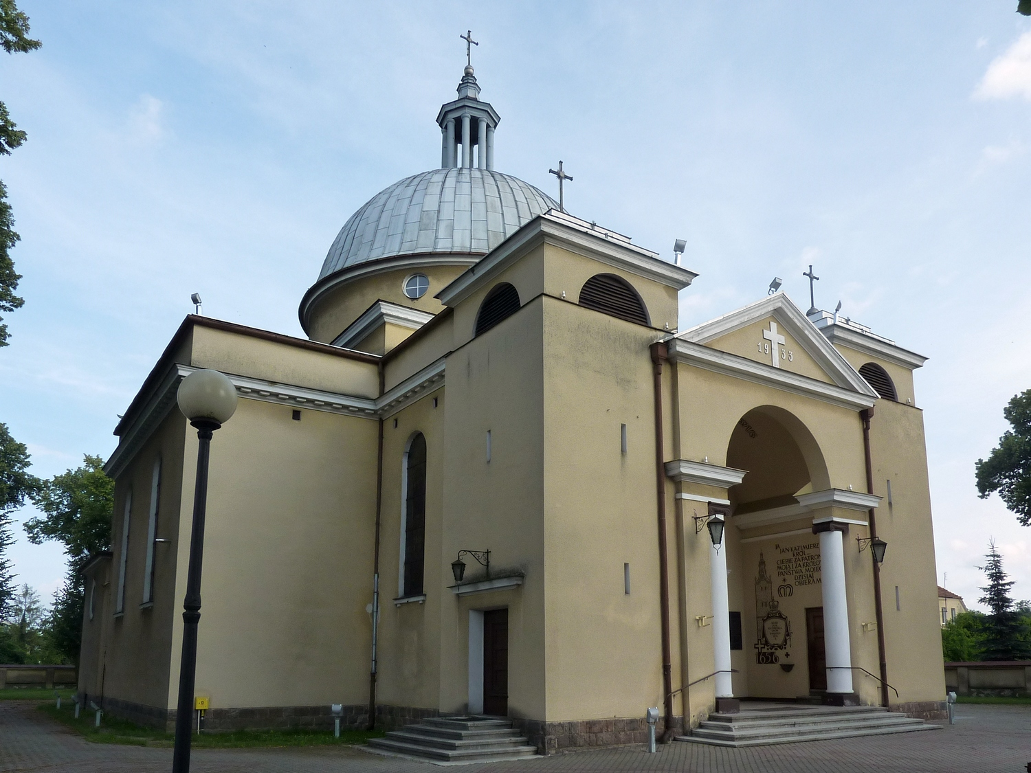 Strzałkowo, ul. Księdza Stanisława Marusarza 5 - rzymskokatolicki kościół parafialny p.w. św. Doroty.